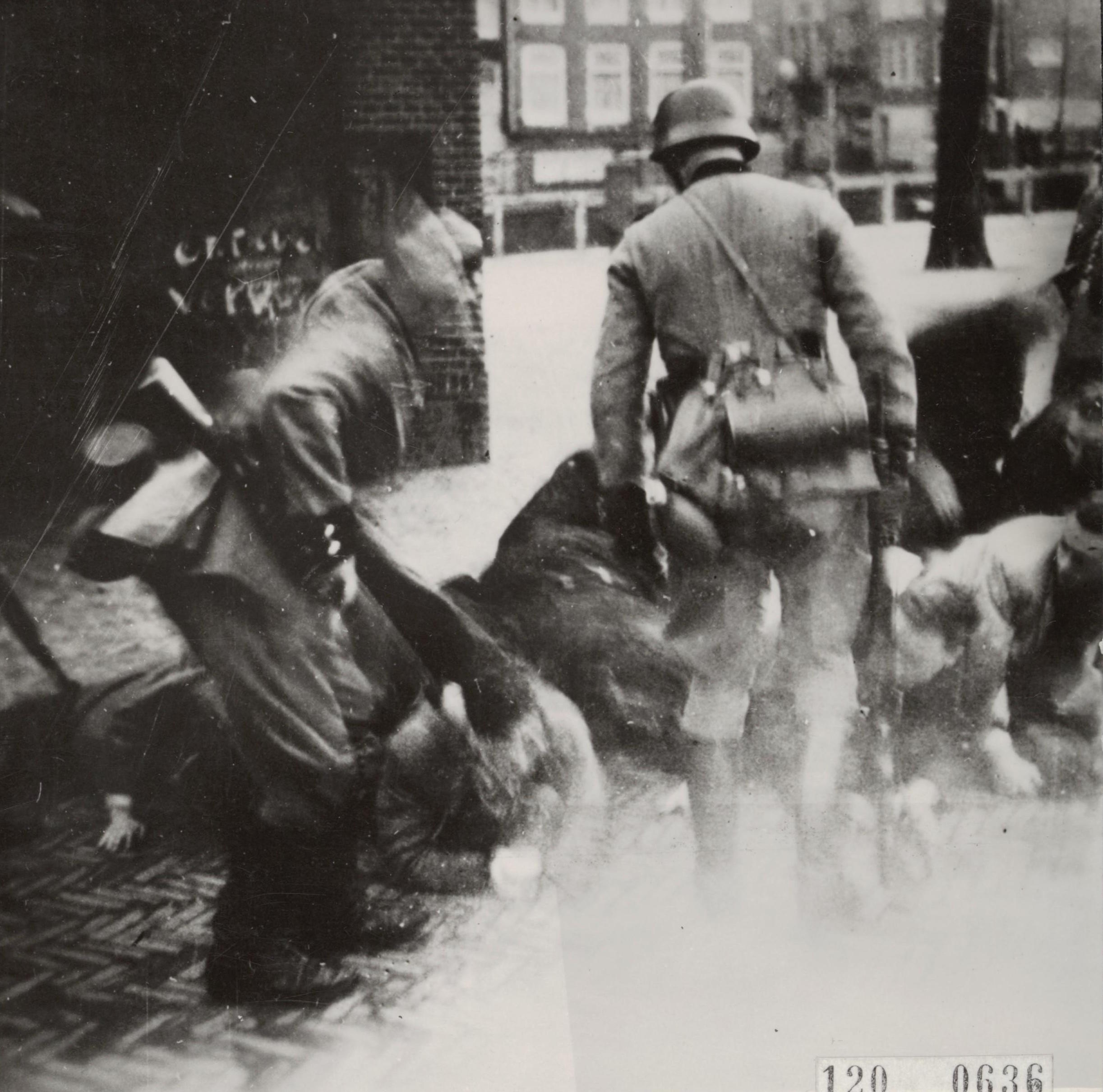 Duitse razzia op het Jonas Daniël Meijerplein te Amsterdam